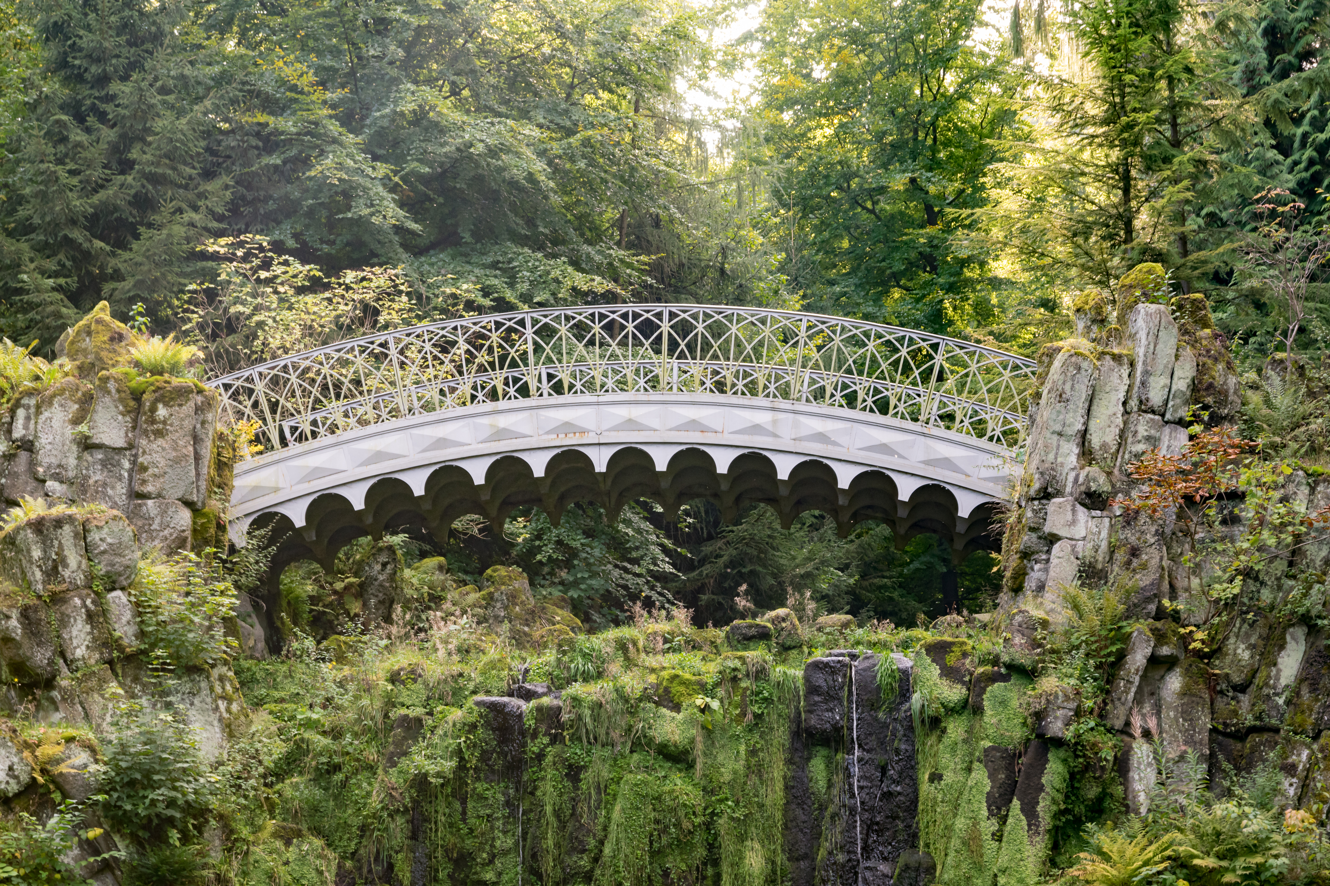 Teufelsbrücke im Bergpark Wilhelmshöhe